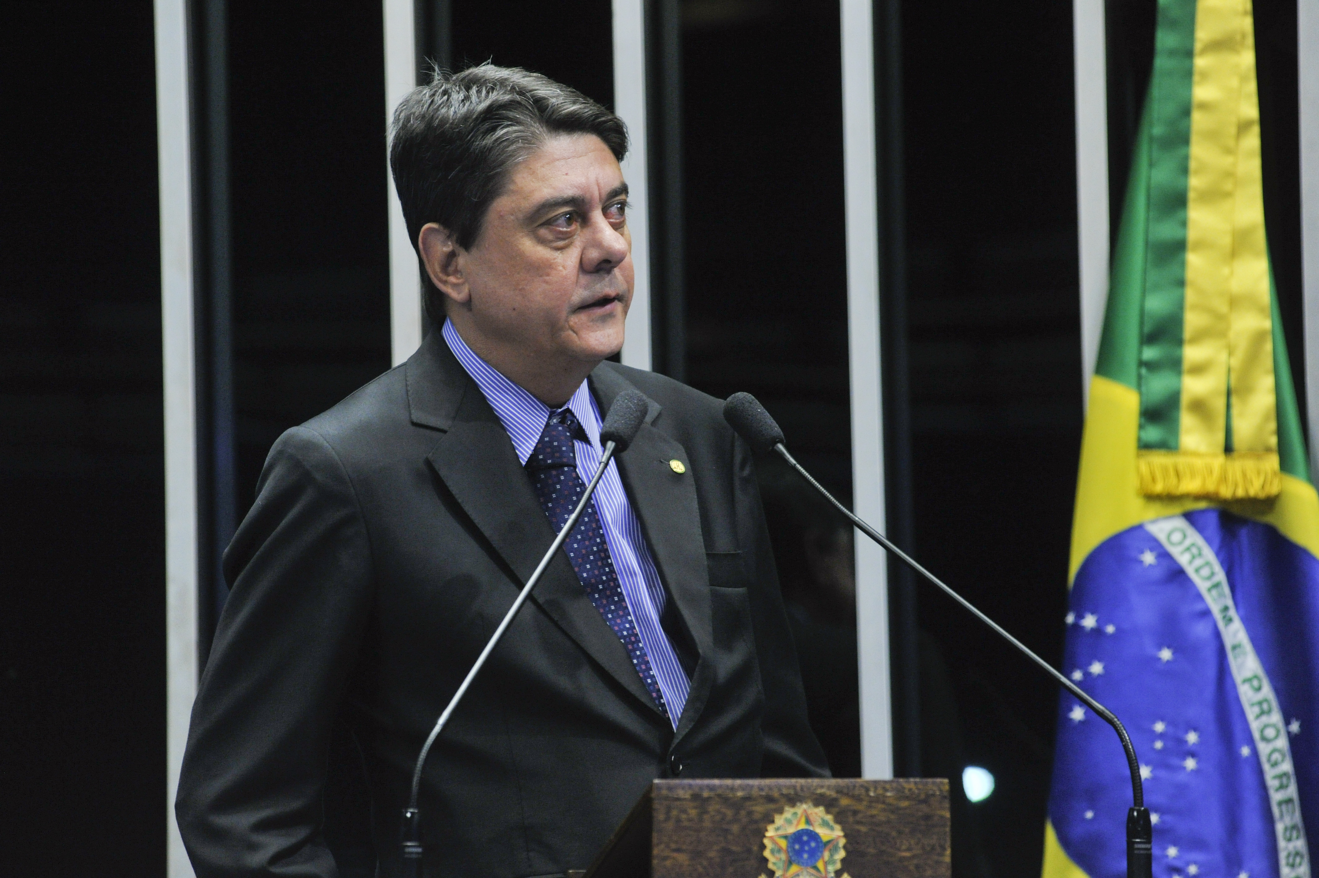 Plenário do Senado durante sessão Solene destinada a homenagear os oitenta e cinco anos da Ordem dos Advogados do Brasil (OAB). Em discurso, deputado Wadih Nemer Damous Filho (PT-RJ). Foto: Geraldo Magela/Agência Senado